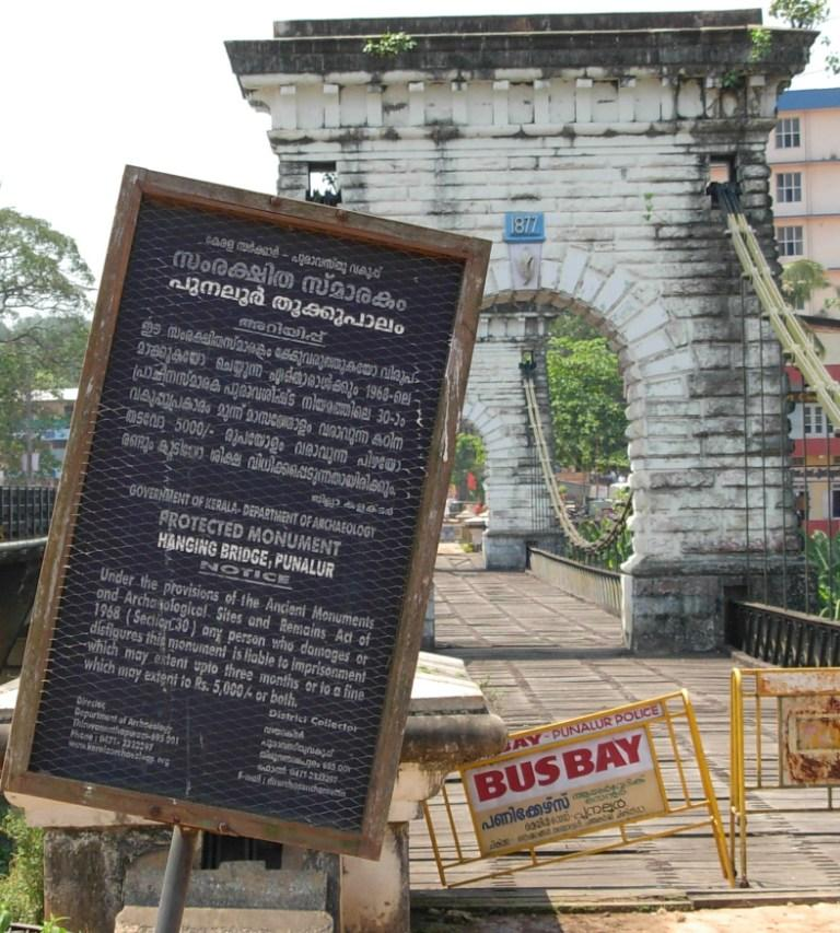 തൂക്കുപാലം - സംരക്ഷിത സ്മാരകം